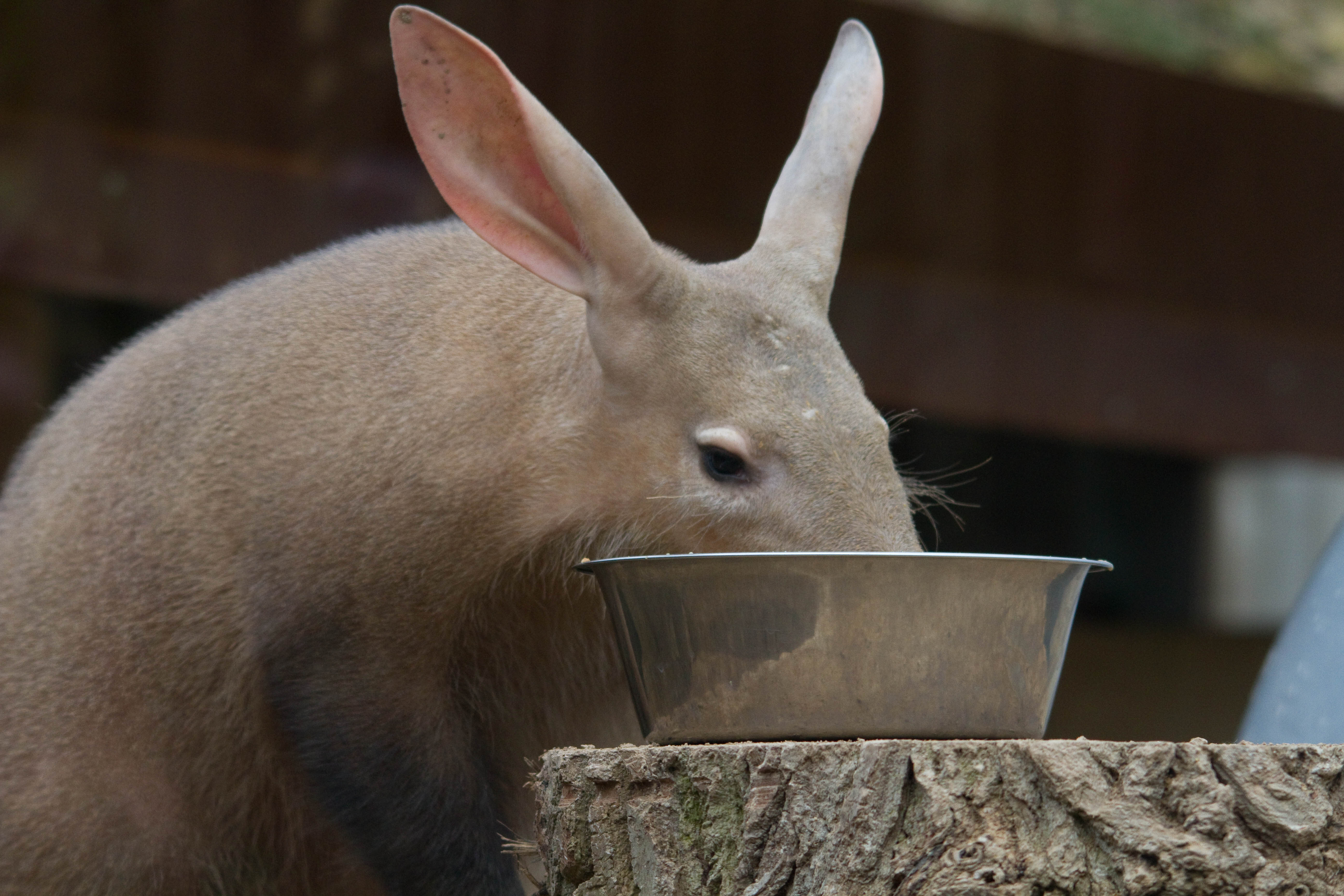 An aardvark feeding in the London Zoo.